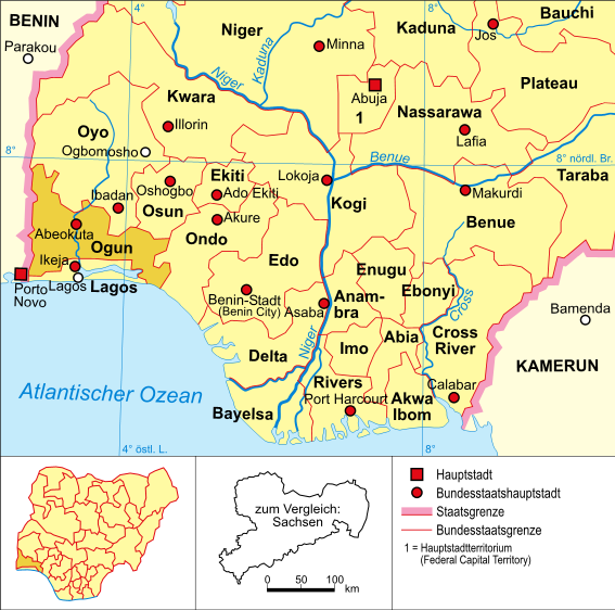 Politische Karte Nigerias (Bundesstaat Ogun hervorgehoben)